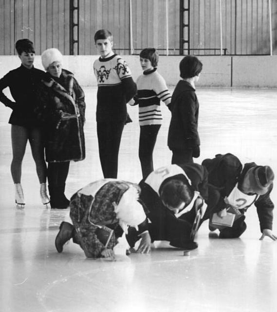 Günter Zöller, Gabriele Seyfert, Martina Clausner Zentralbild Studré Ma-Wo. 19.12.1964 Eiskunstlauf: II. Überprüfungslaufen der deutschen Meisterklasse für die Europameisterschaften 1965 am 19. und 20.12.1964 in Berlin. UBz: Ein typisches Bild während der Pflichtwettbewerbe. Die Kampfrichter prüfen die eingezeichnete Spur im Eis. Im Hintergrund als aufmerksame Beobachter Trainerin Jutta Müller (2.v.l.) mit ihren Schützlingen Gaby Seyfert (links), Günter Zöller und Martina Clausner (alle SC Karl-Marx-Stadt).